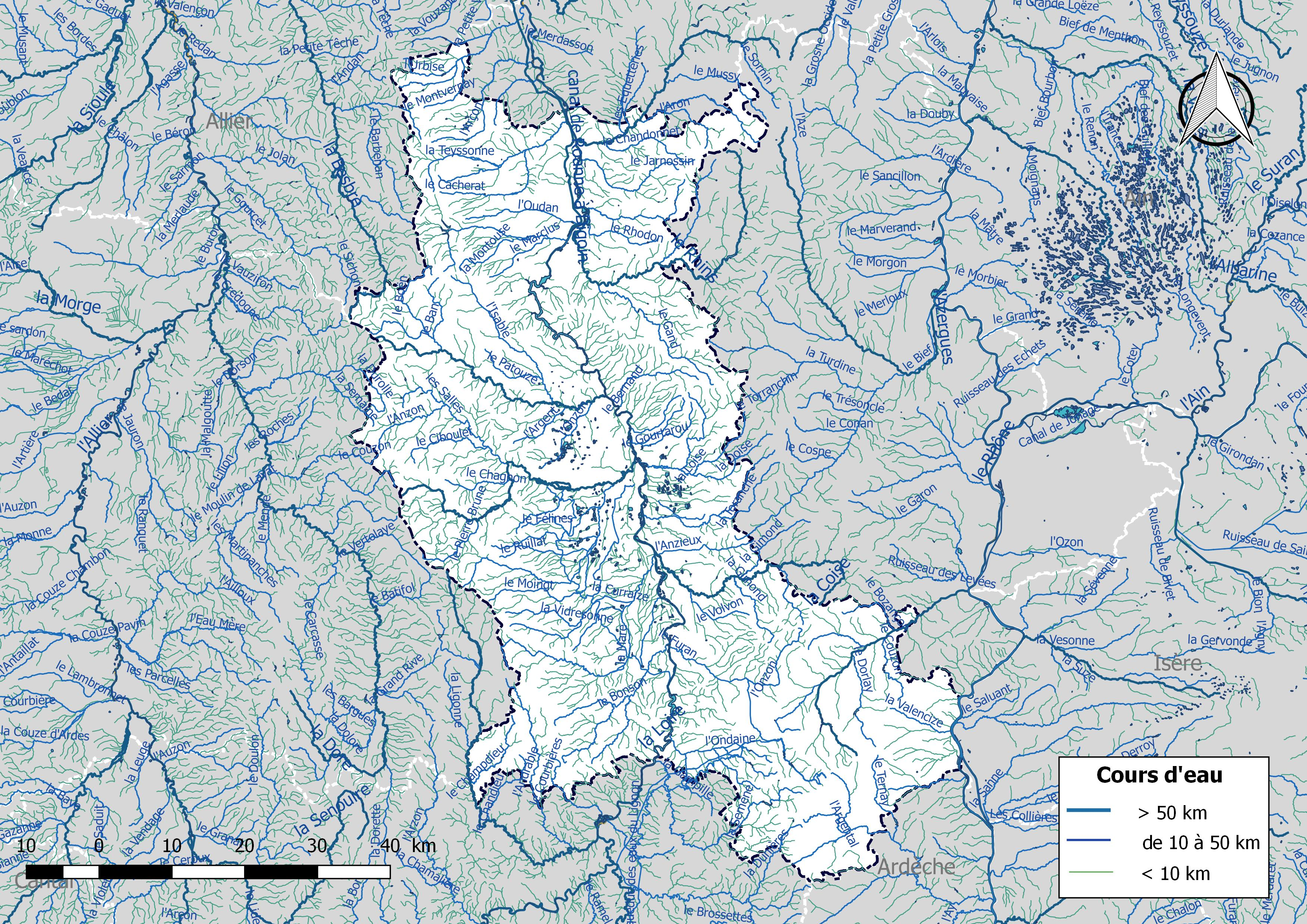 Réseau hydrographique du département de la Loire (France).